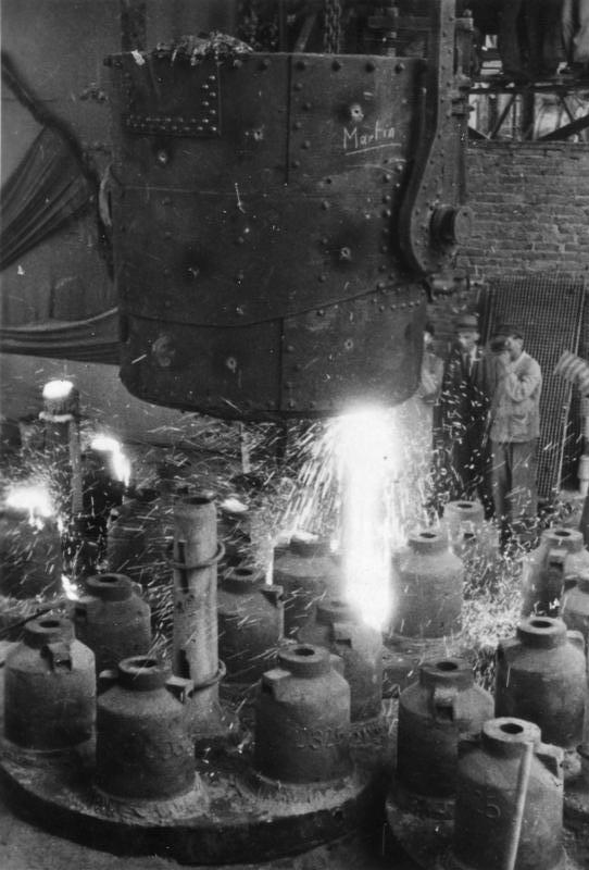 Stahlwerk Döhlen bei Dresden Illus-Braun Gußstahlwerk Döhlen bei Dresden. U.B.z.: Die Inbetriebnahme des ersten 10 to Martinofens im Gußtahlwerk Döhlen am 1.7.49. 5467-50